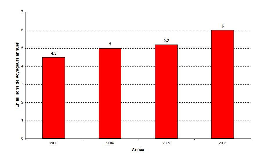 Graphique de présentation de la fréquentation de la gare de Rouen